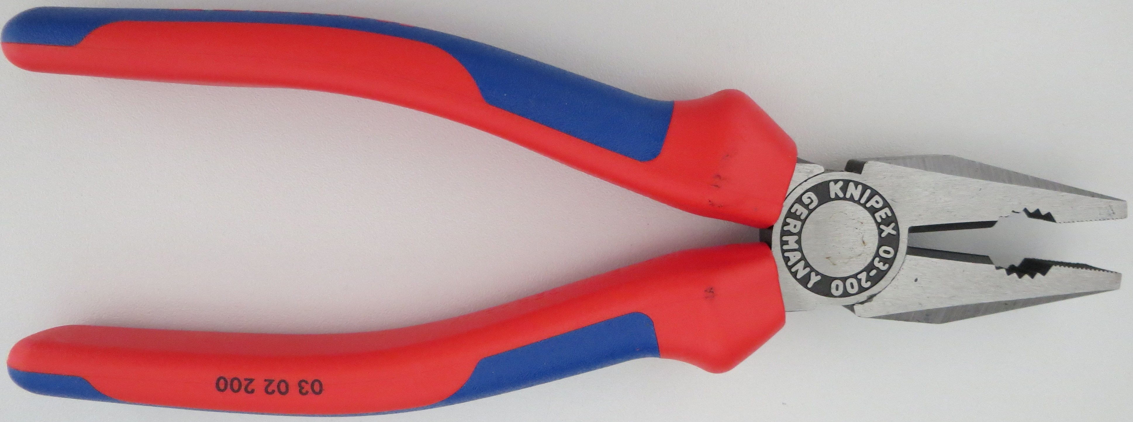 Kombinationszange